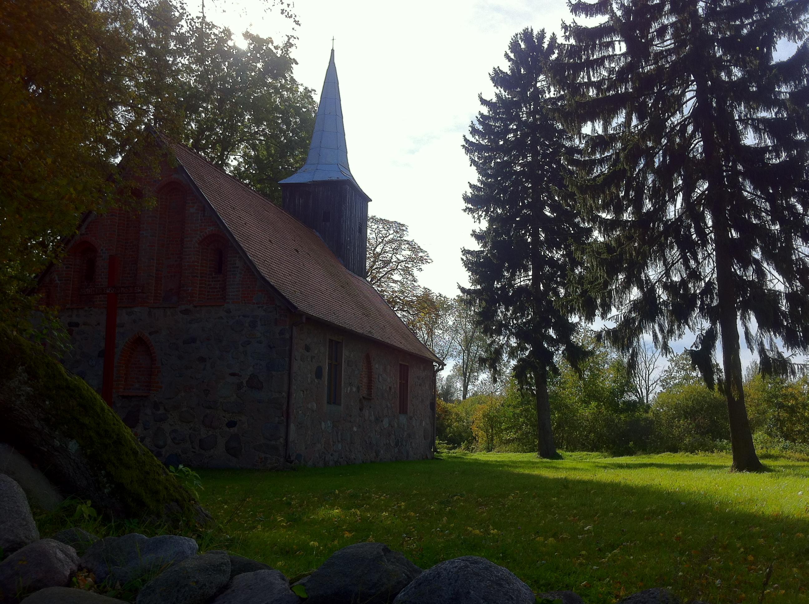 Jarchlino - rzymskokatolicki kościół parafialny p.w. św. Józefa, XV, XIX